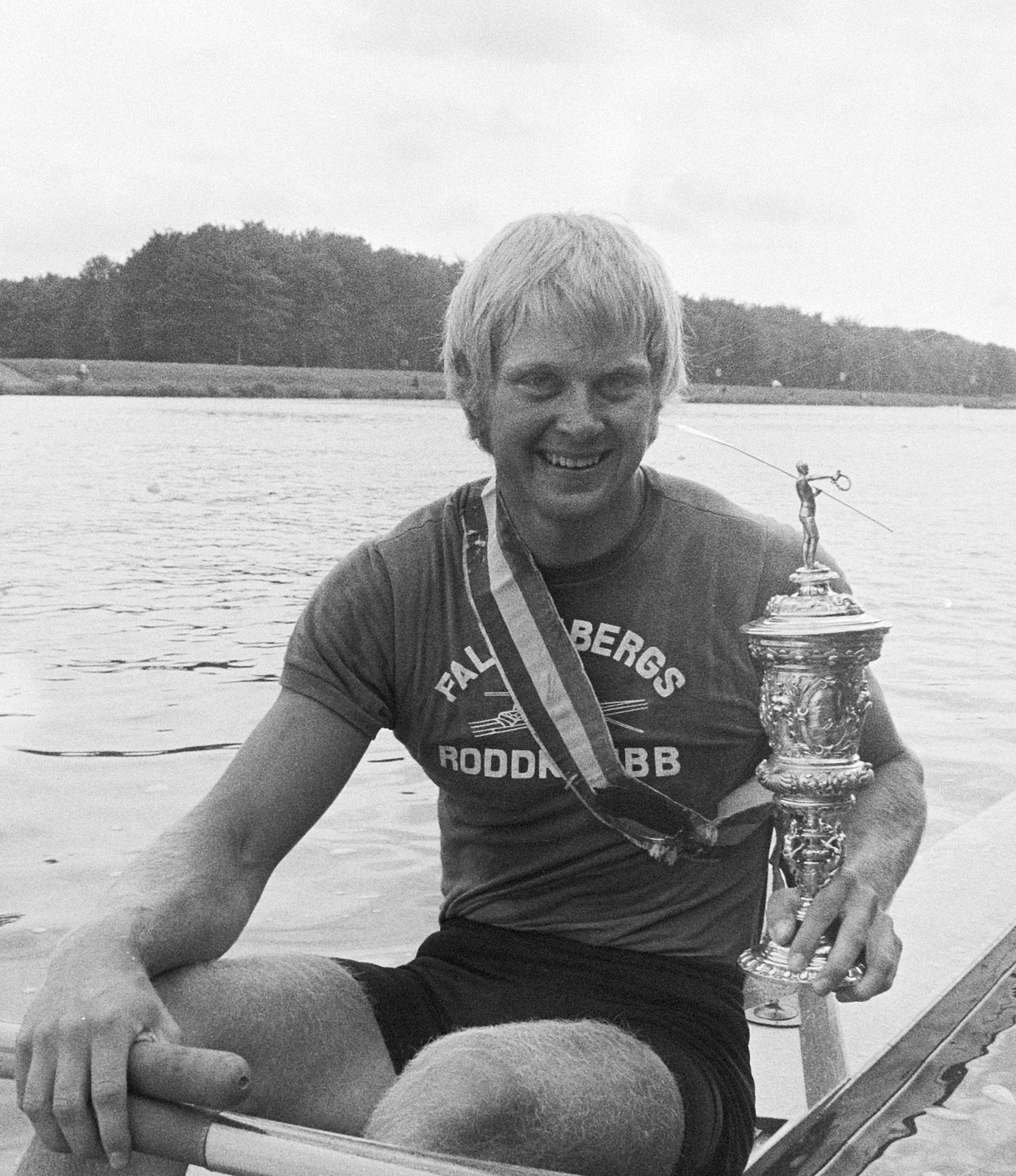 Roeien, Holland Beker ; winnaar Holland Beker Svenson